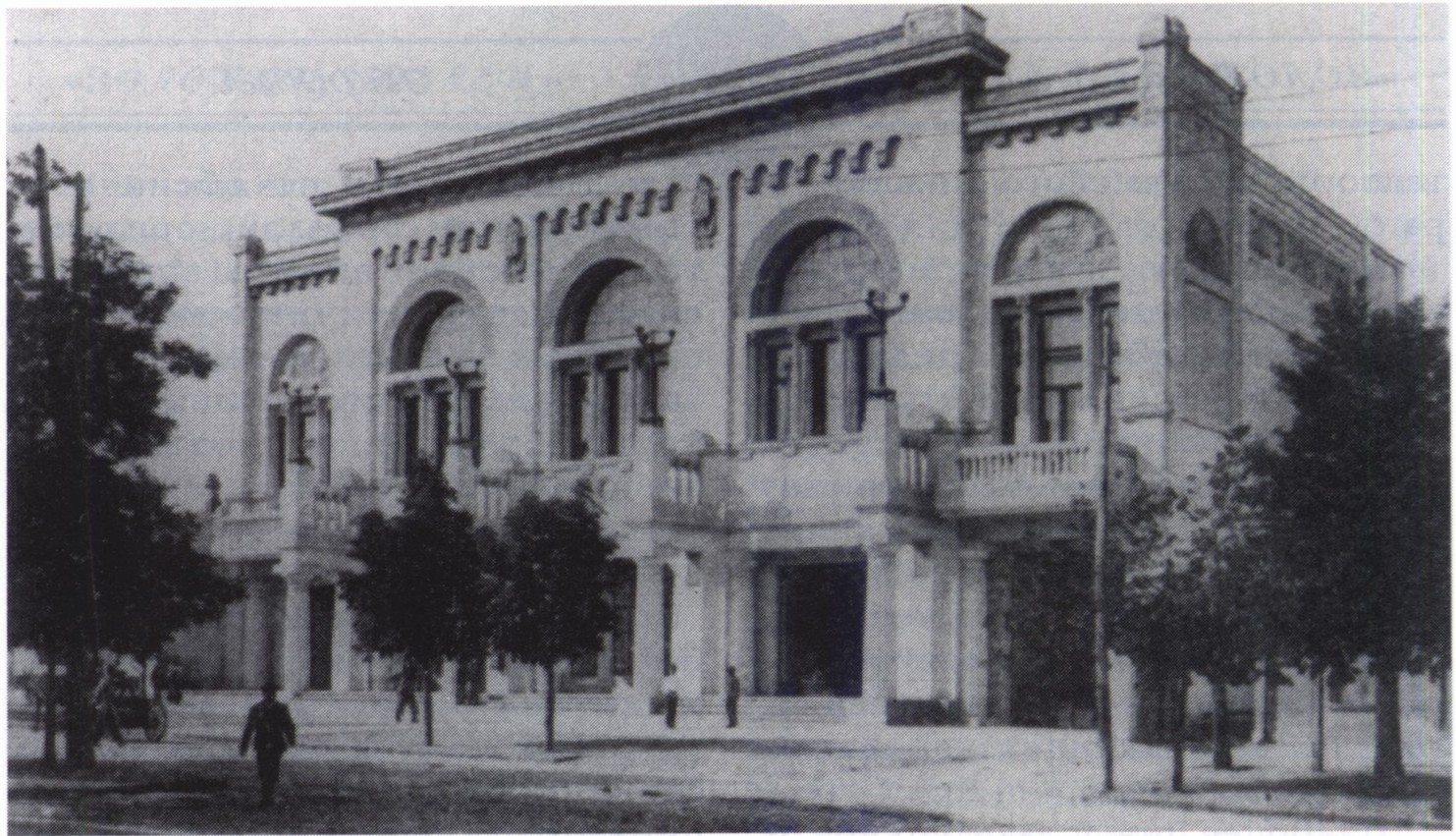 Здание Общества Взаимного Кредита в Симферополе. Главный фасад. 1913 г. Архитектор Н.П. Краснов